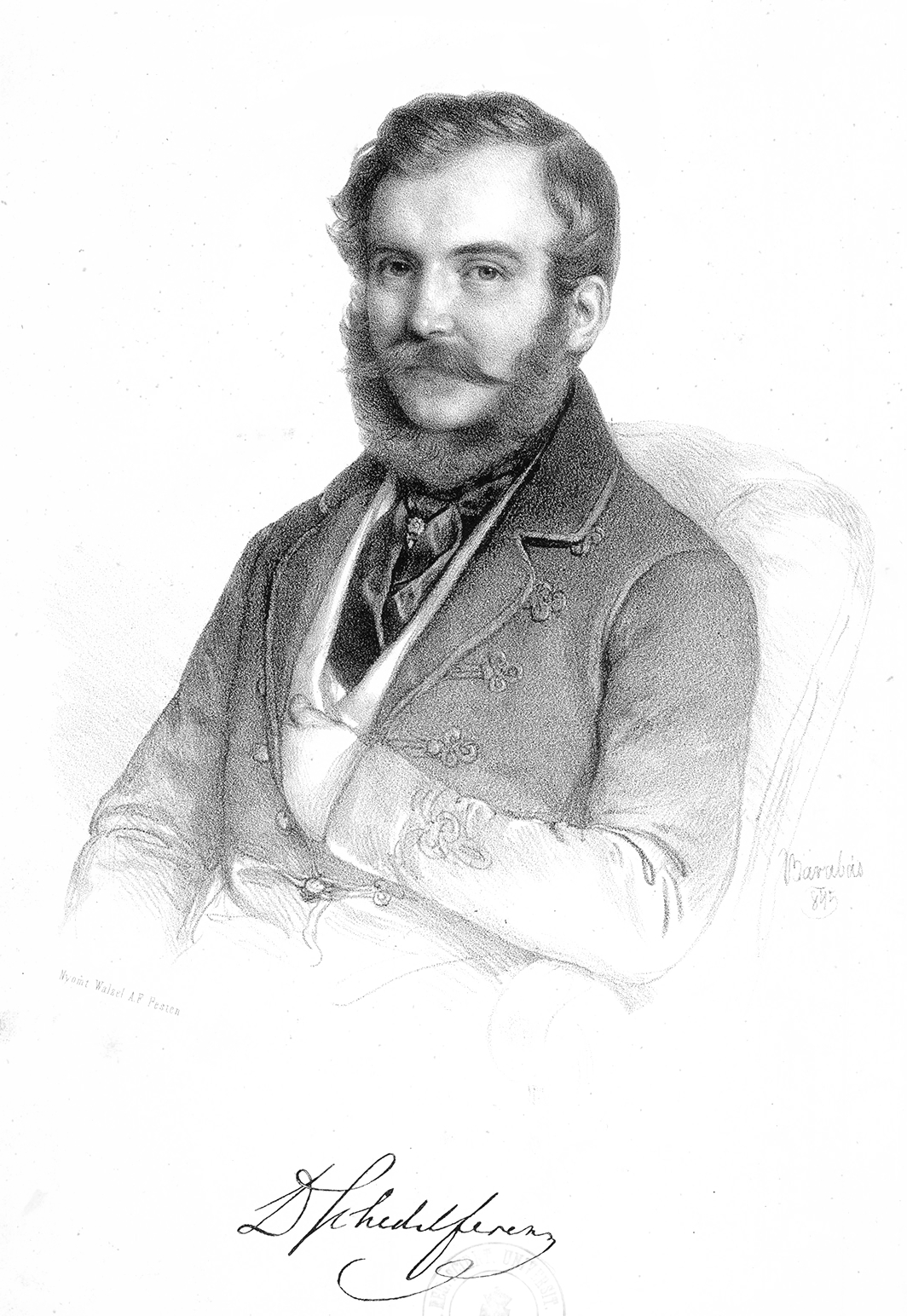 Toldy Ferenc (Buda, 1805. augusztus 10. – Budapest, 1875. december 10.) irodalomtörténész, kritikus, egyetemi tanár, a Magyar Tudományos Akadémia tagja, titkára, a Kisfaludy Társaság másodelnöke, Toldy István író, újságíró és Toldy László fővárosi főlevéltárnok apja. Schedel Ferenc postatiszt és Thalherr Jozefin fiaként született.